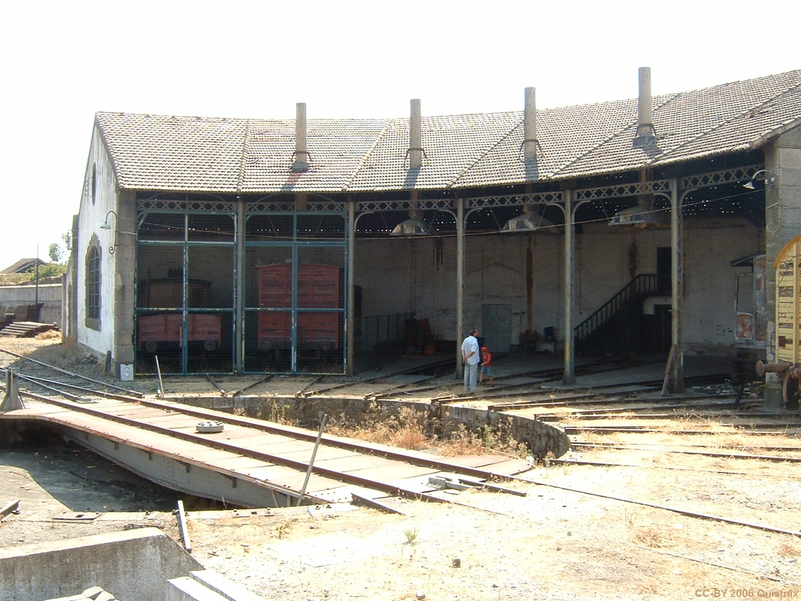 Draaischijf bij het station van Castelo Branco (Portugal). eigen werk.